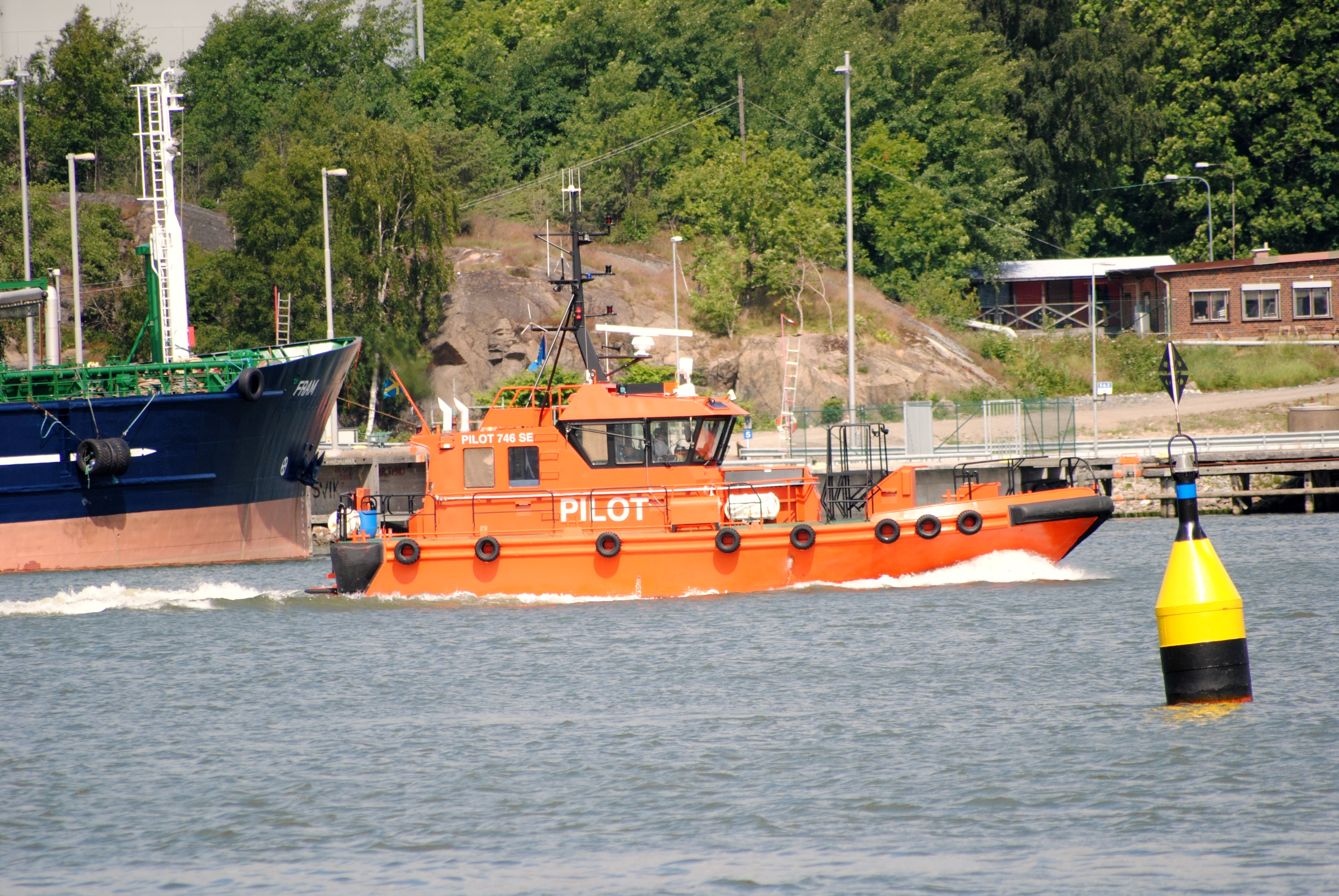 Pilot 746 Passerar Skandiahamnen